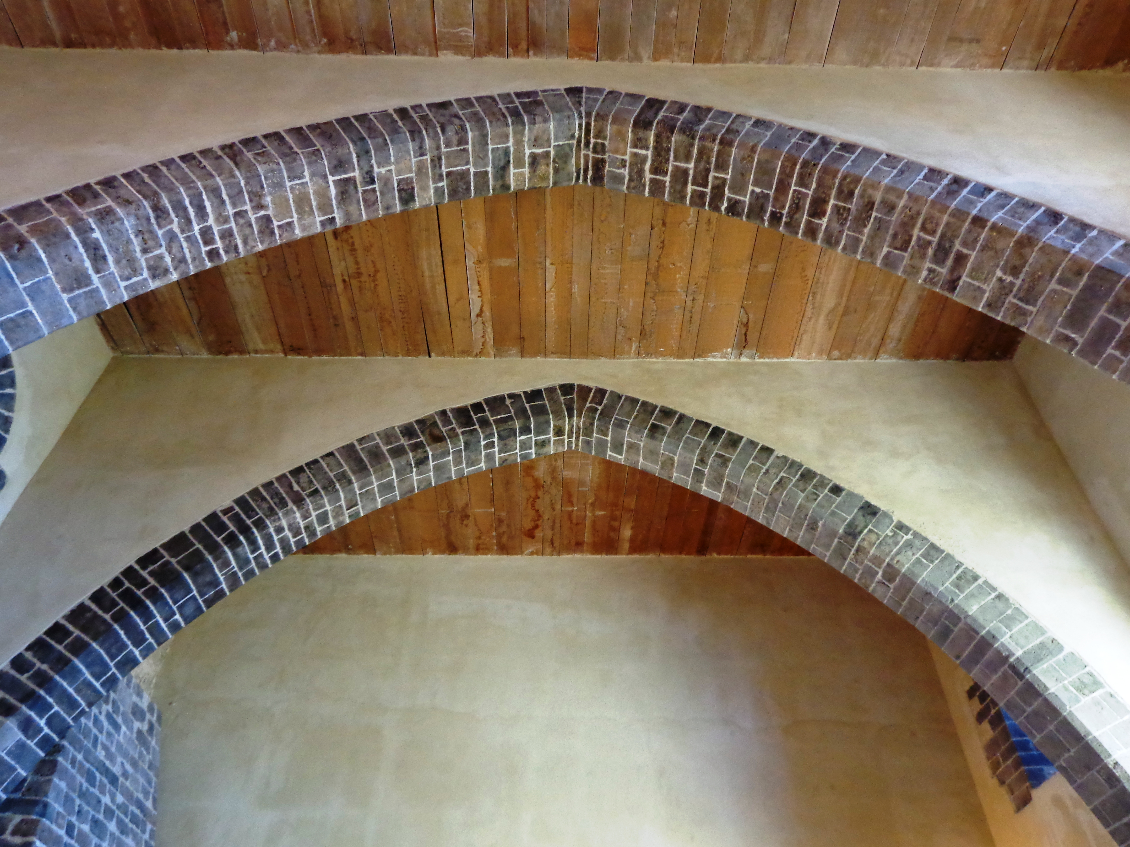 Nervature Sala del Parlamento